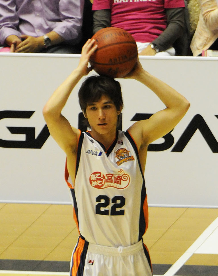 宮崎シャイニングサンズ、藤田弘輝選手。秋田県立体育館で。